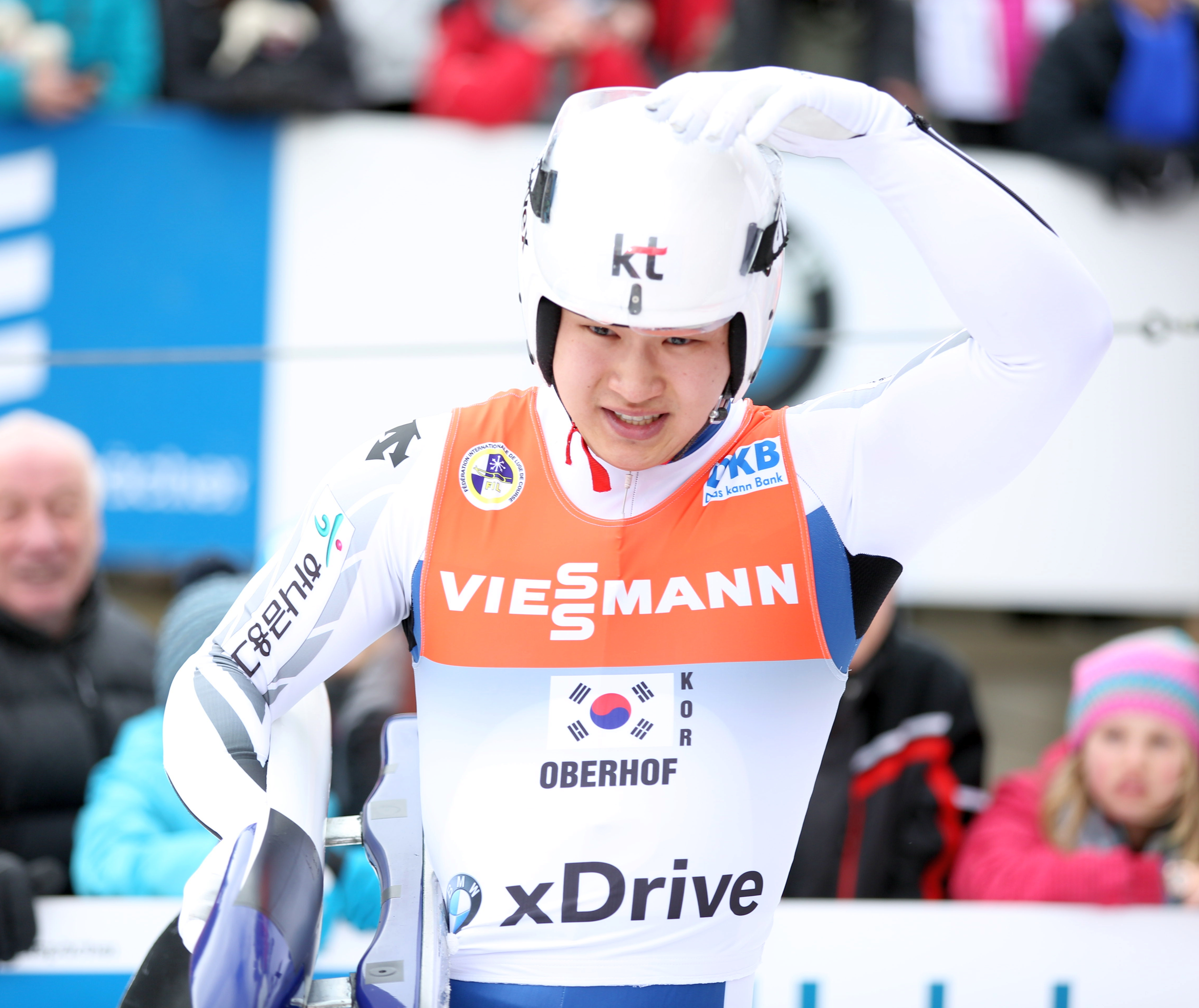 Donghyeon Kim beim Rennrodel-Weltcup 2017 in Oberhof